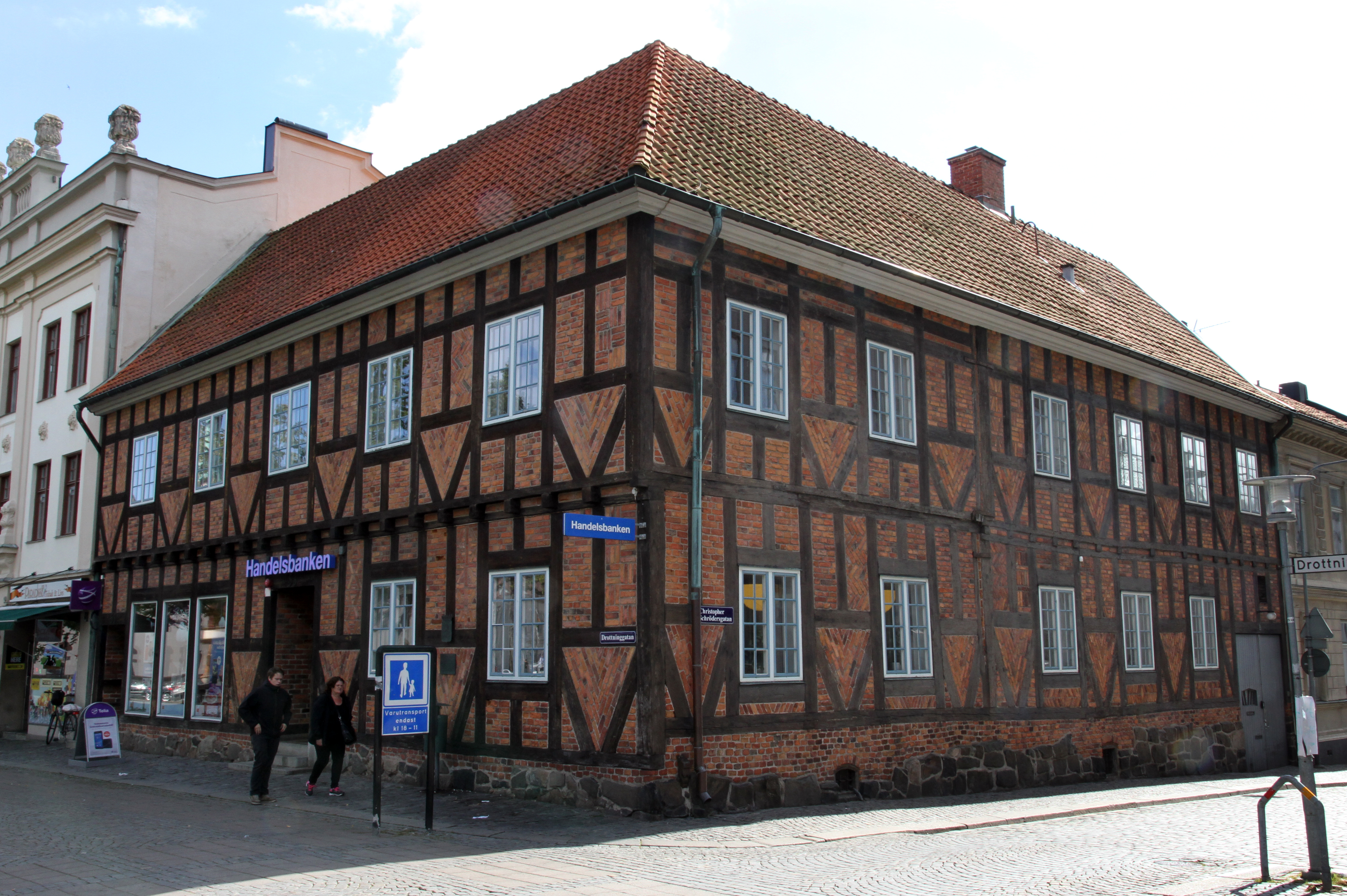 Asschierska huset, Karlshamn 21 juli 2015